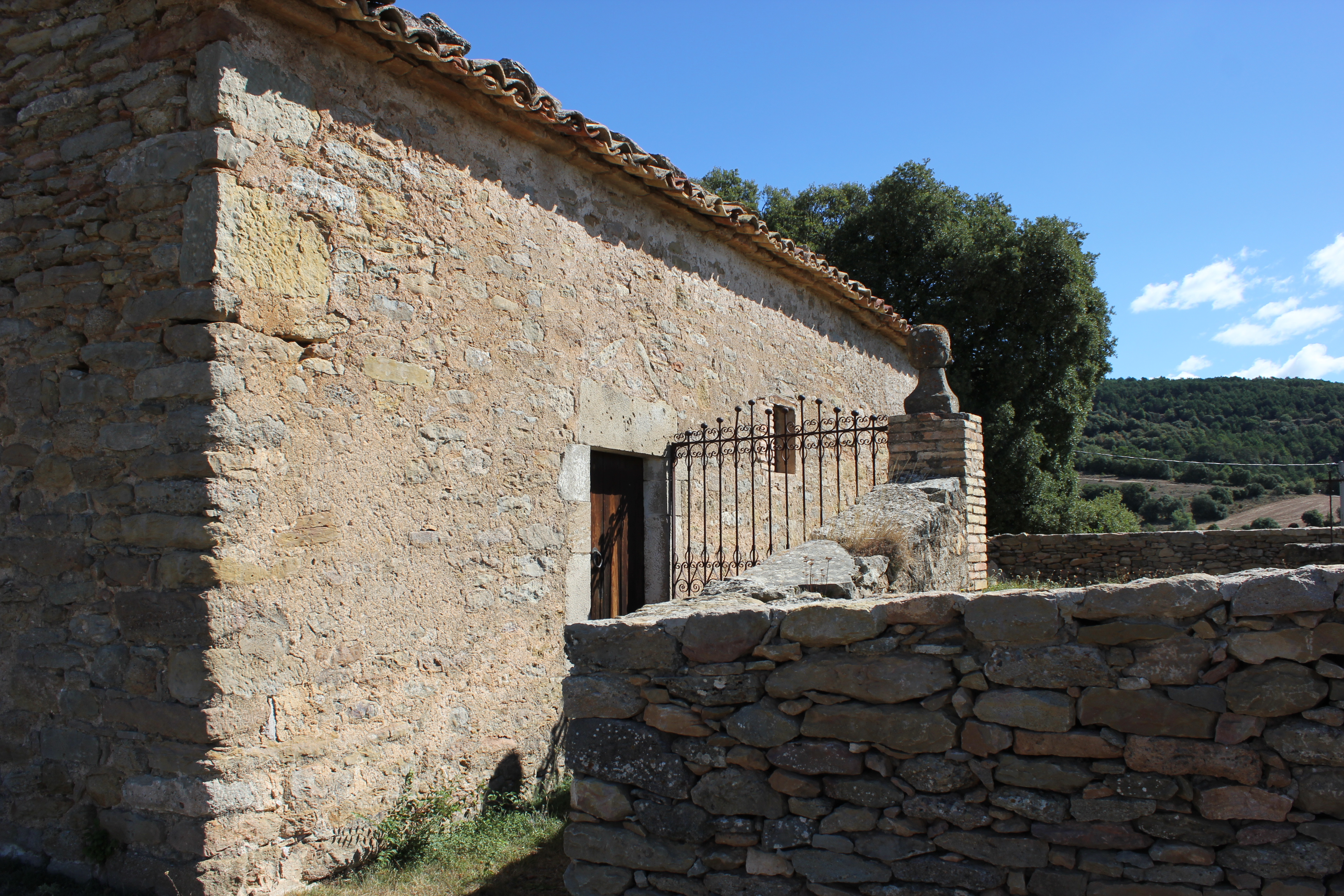 Vista de la paret del cementiri i la porta d'entrada a l'església de Sant Miquel de Vilanova (Lladurs).